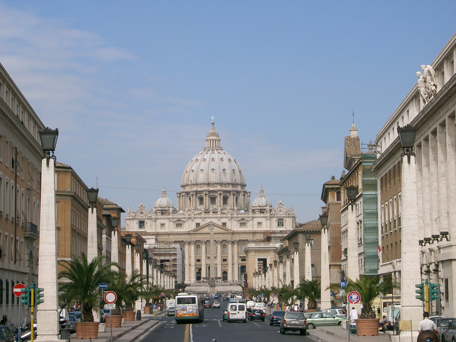 Basilica di San Pietro From Via della Conciliazione